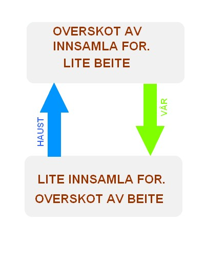 Frammstilling av leigefeordninga i Noreg.